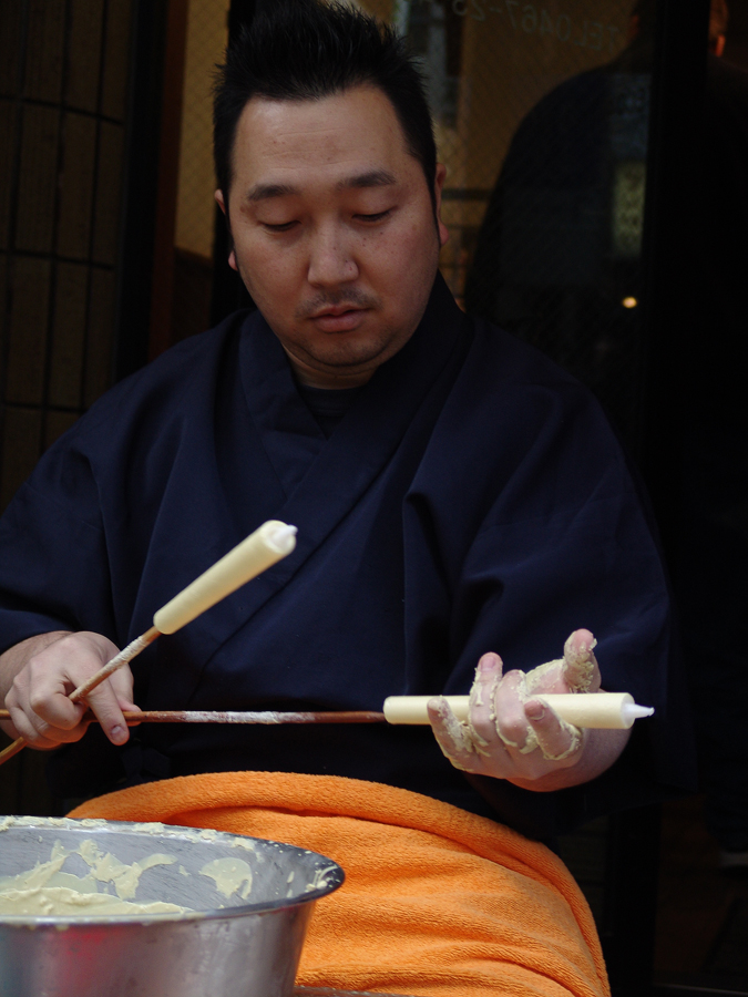 Candle maker: At Kamakura